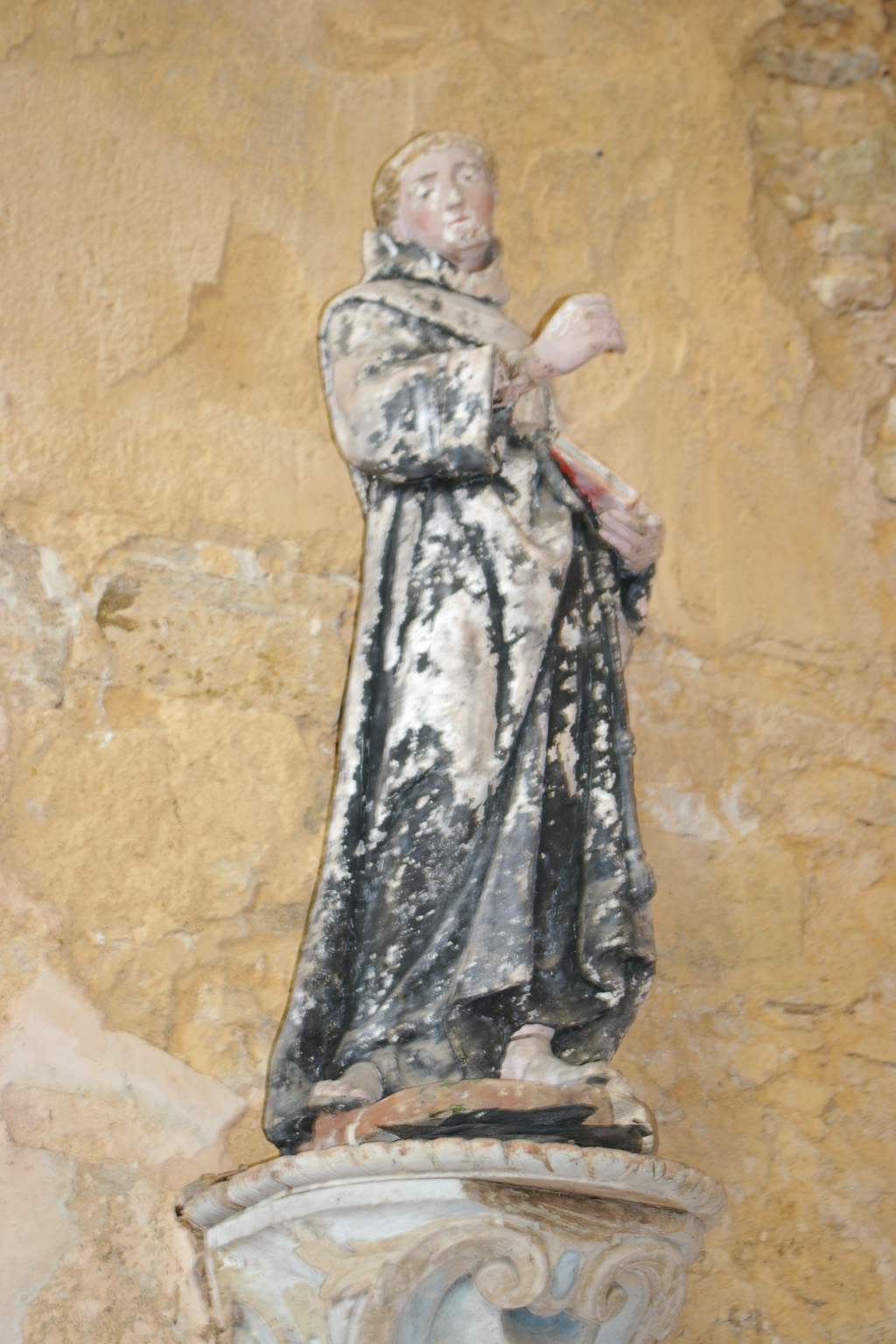 statue de Saint-Alleaume (dans l'église de Sainte-Suzanne (Mayenne) ou de Saulges